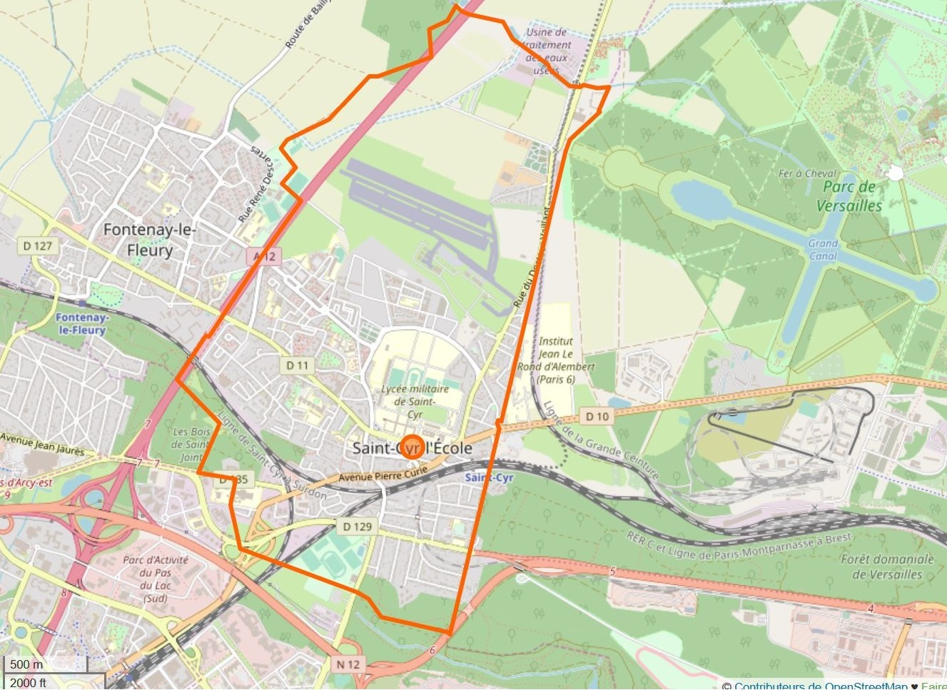 Cette carte a été créée à partir des données du projet Openstreetmap. This map may be incomplete, and may contain errors. Don't rely solely on it for navigation.